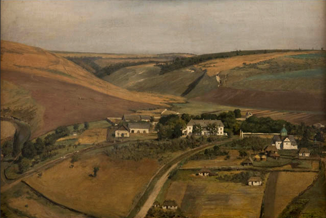 Adam Chmielewski - Zawale, obraz w Muzeum Narodowym w Krakowie